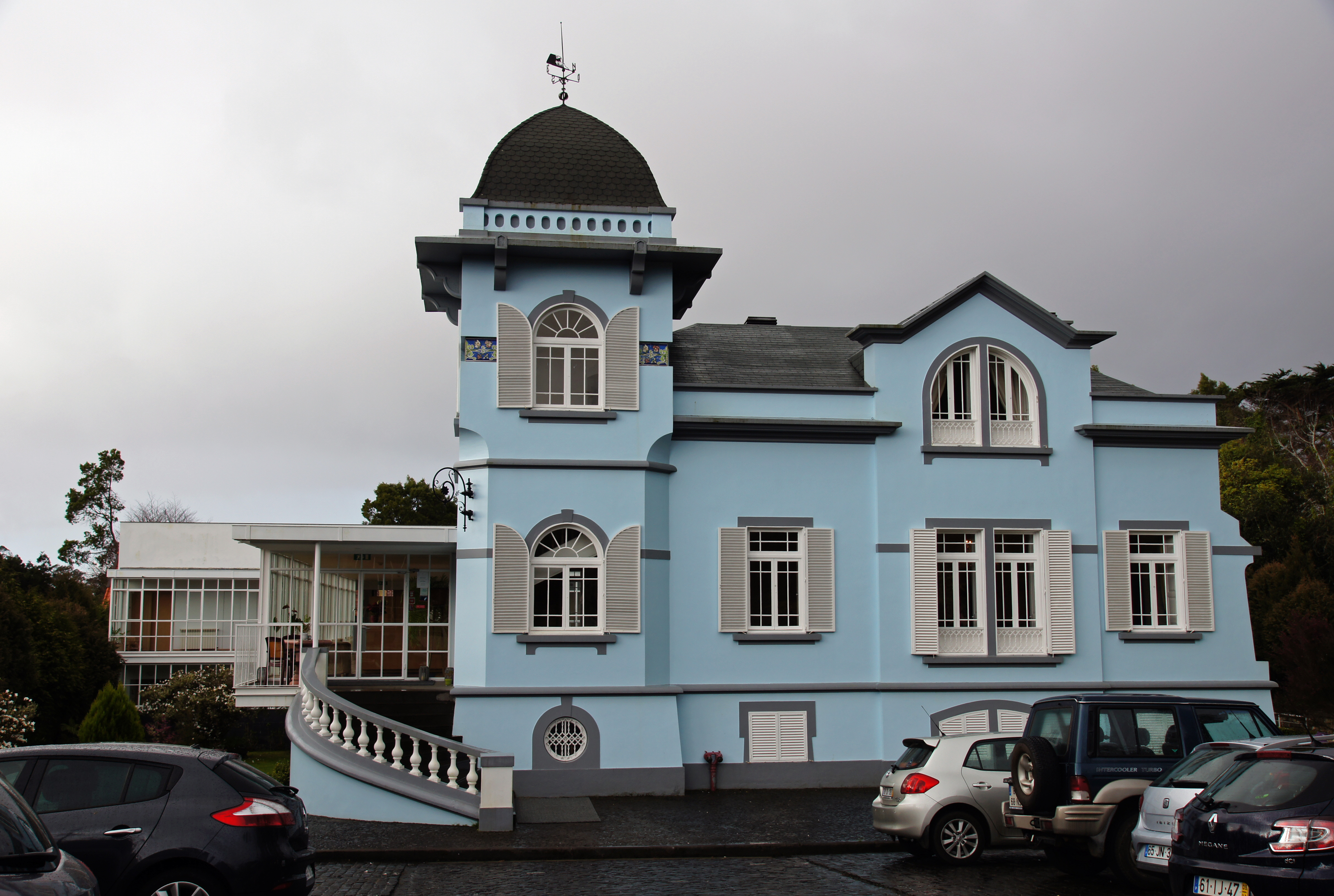 Hotel Estalagem Serra Golf, Santo da Serra